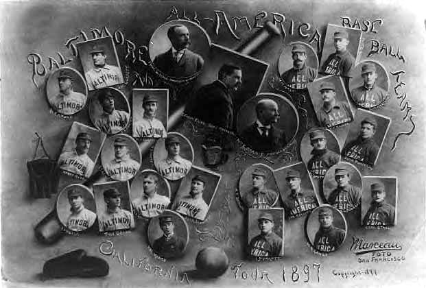 1897 Baltimore Orioles